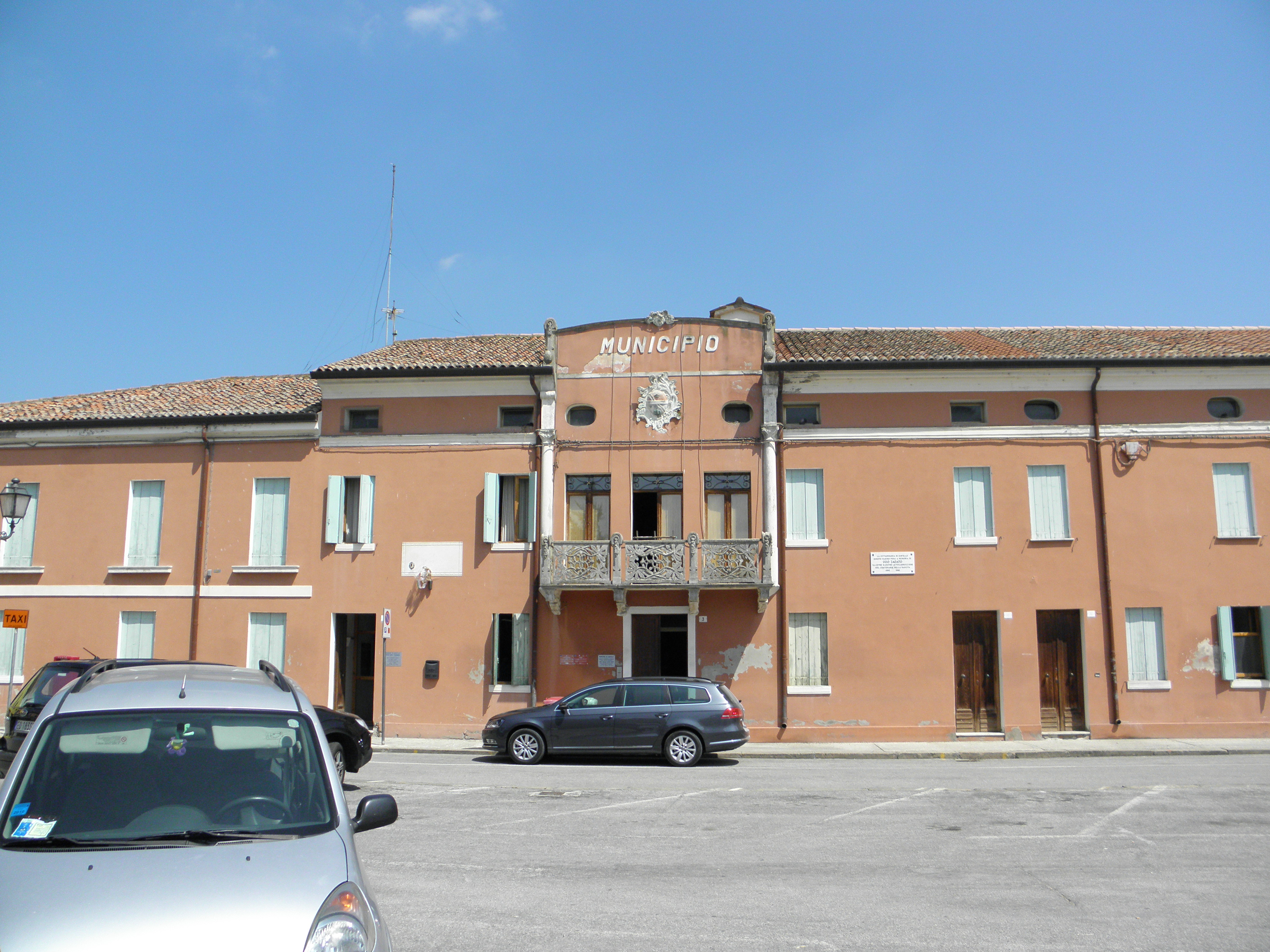 Gavello: Palazzo Grimani, attualmente sede del municipio.